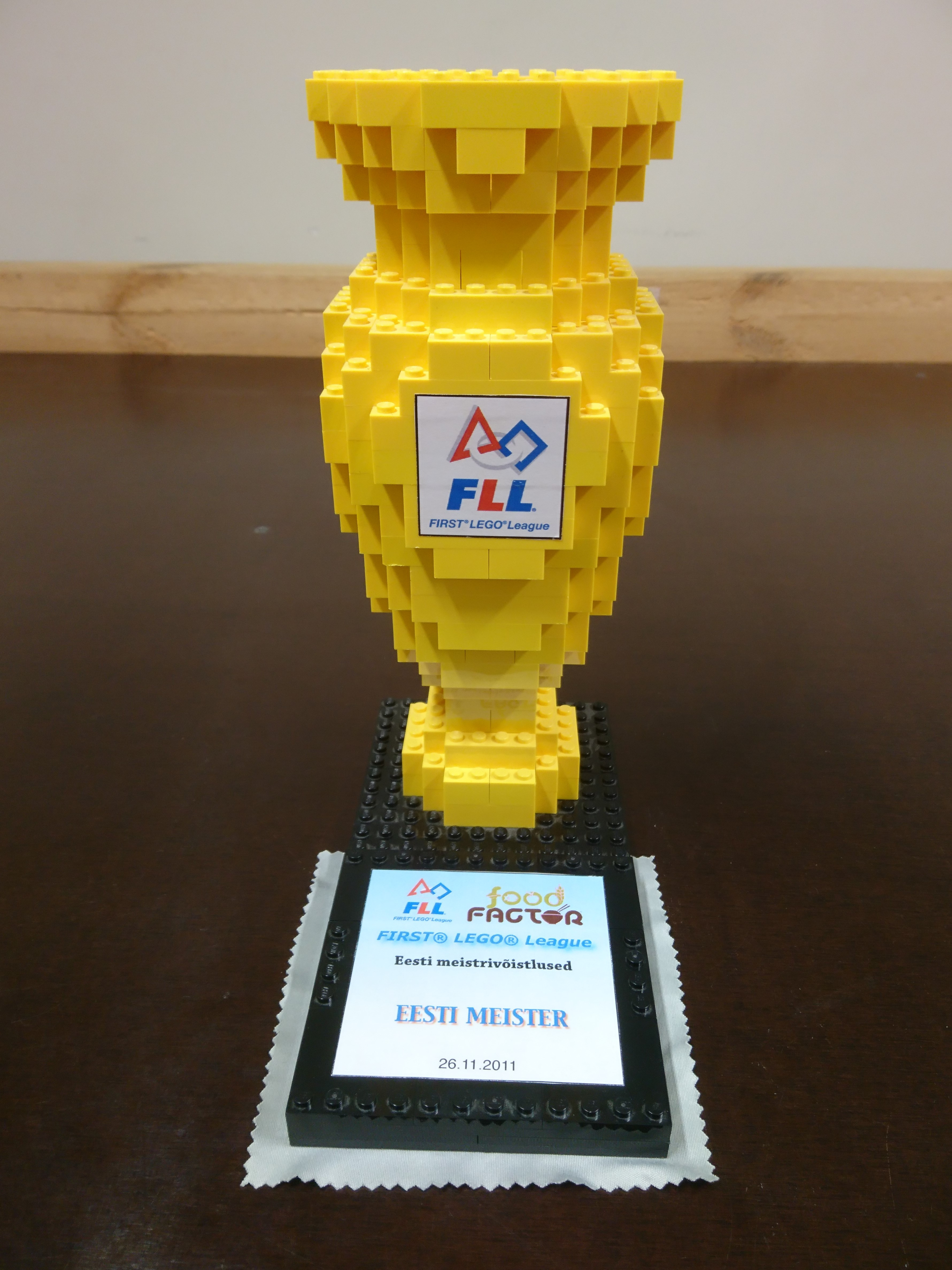 2011/2012 FLL hooaja meistrikarikas